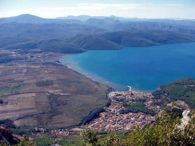 Akyaka general view, Turkey